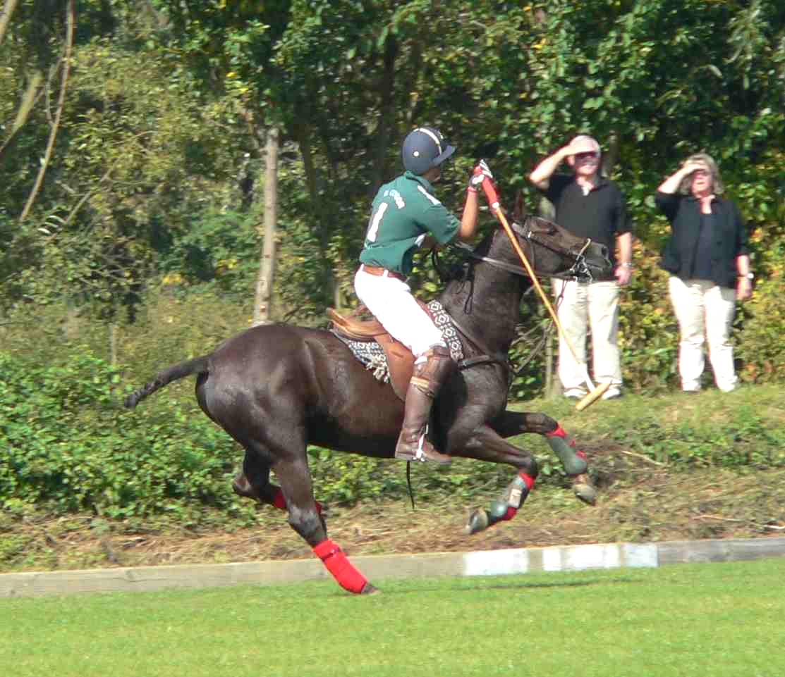 Polo